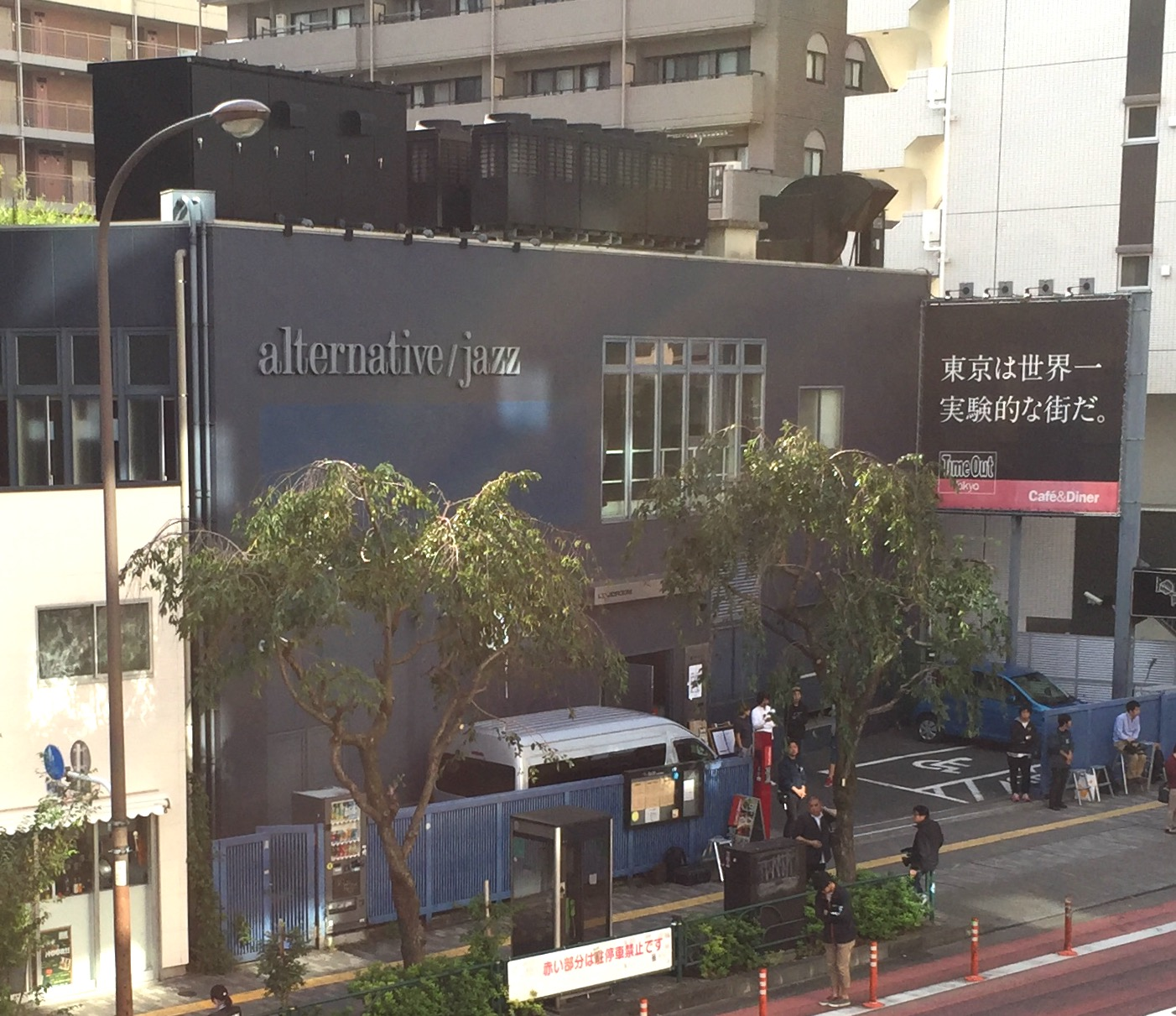 Corsu: SHIBUYA (Ebisu) Liquid Room Live house